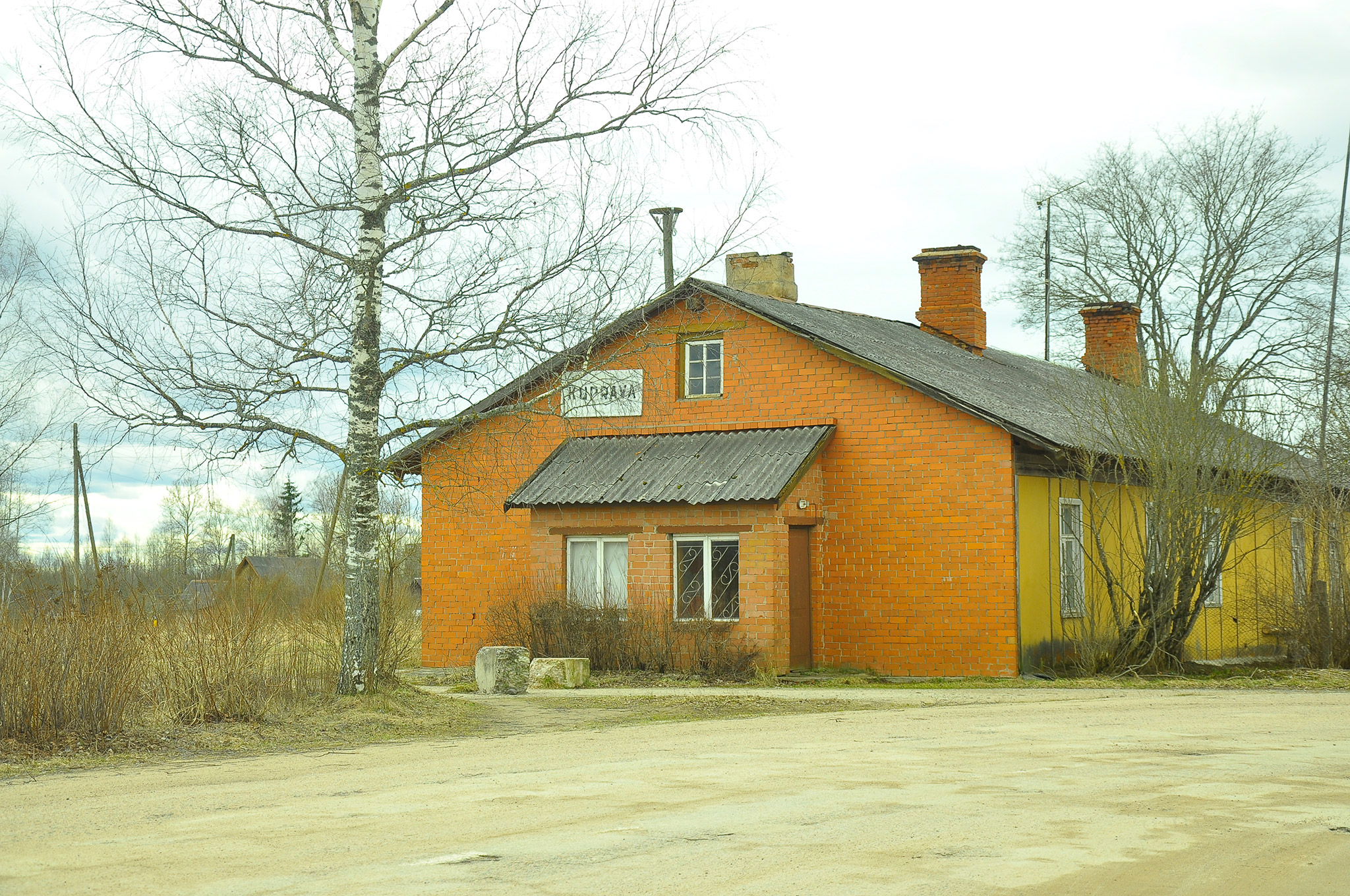 Dzelzceļa stacija "Kuprava" slēgtajā līnijā Ieriķi - Abrene